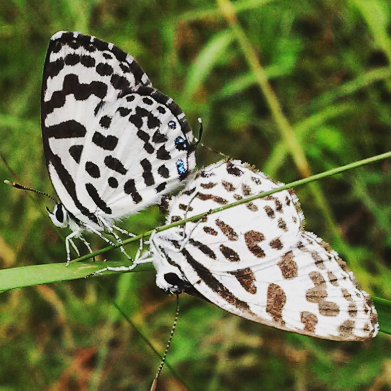 ഇന്ത്യയിൽ കണ്ടിട്ടുള്ളതിൽ വച്ച് Lycaenids or Blues ഫാമിലിയിൽ പെട്ട ഏറ്റവും ചെറിയ ശലഭമാണ് നാട്ടുകോമാളി(Castalius rosimon)